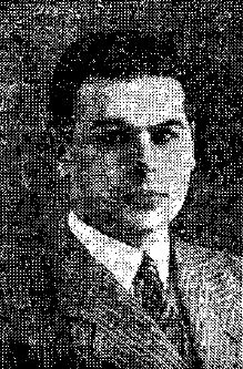 Político tradicionalista